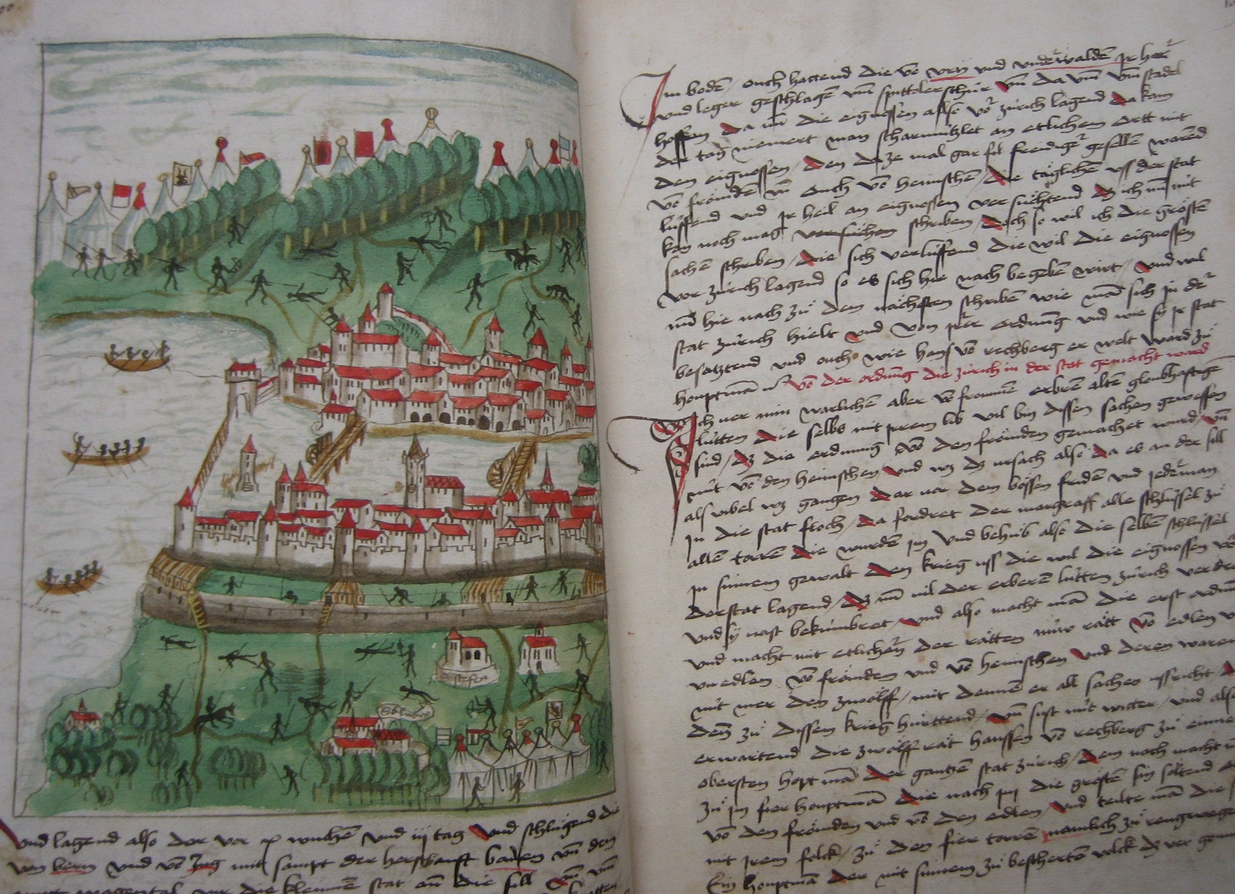 Darstellung aus Edlibachs Zürcher Chronik, 1485. Belagerung Zürichs durch die Eidgenossen 1444. Abbildung seitenverkehrt, gespiegelte Version und Kommentar siehe hier